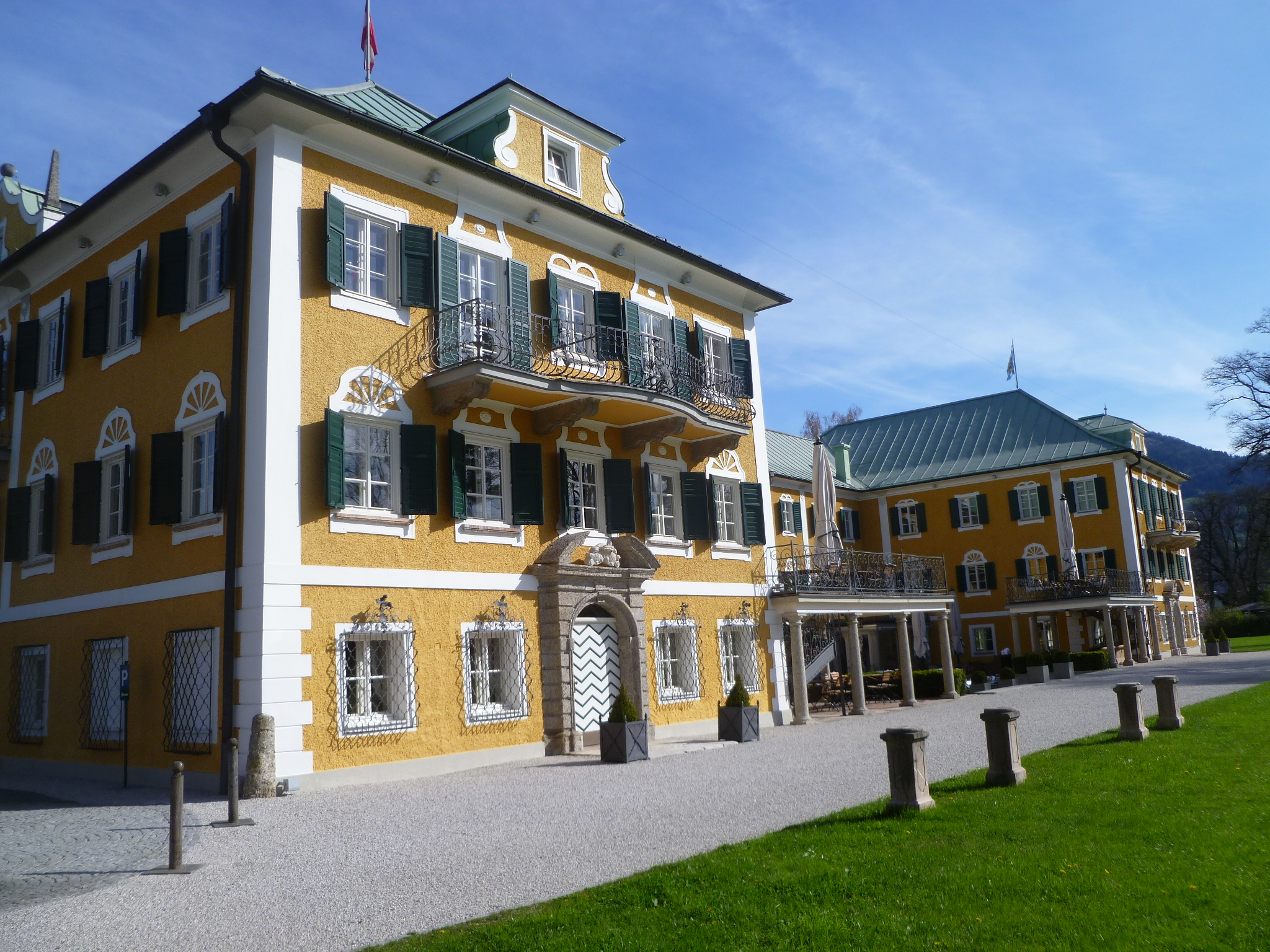 Rupertihof/Schlosshotel St. Rupert